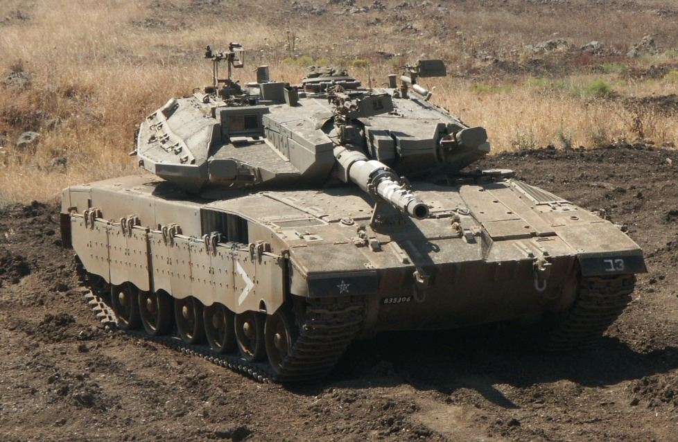 Israeli Merkava tank Mark 3 Baz dor Daled Kasag טנק מרכבה סימן 3ד ב"ז קס"ג